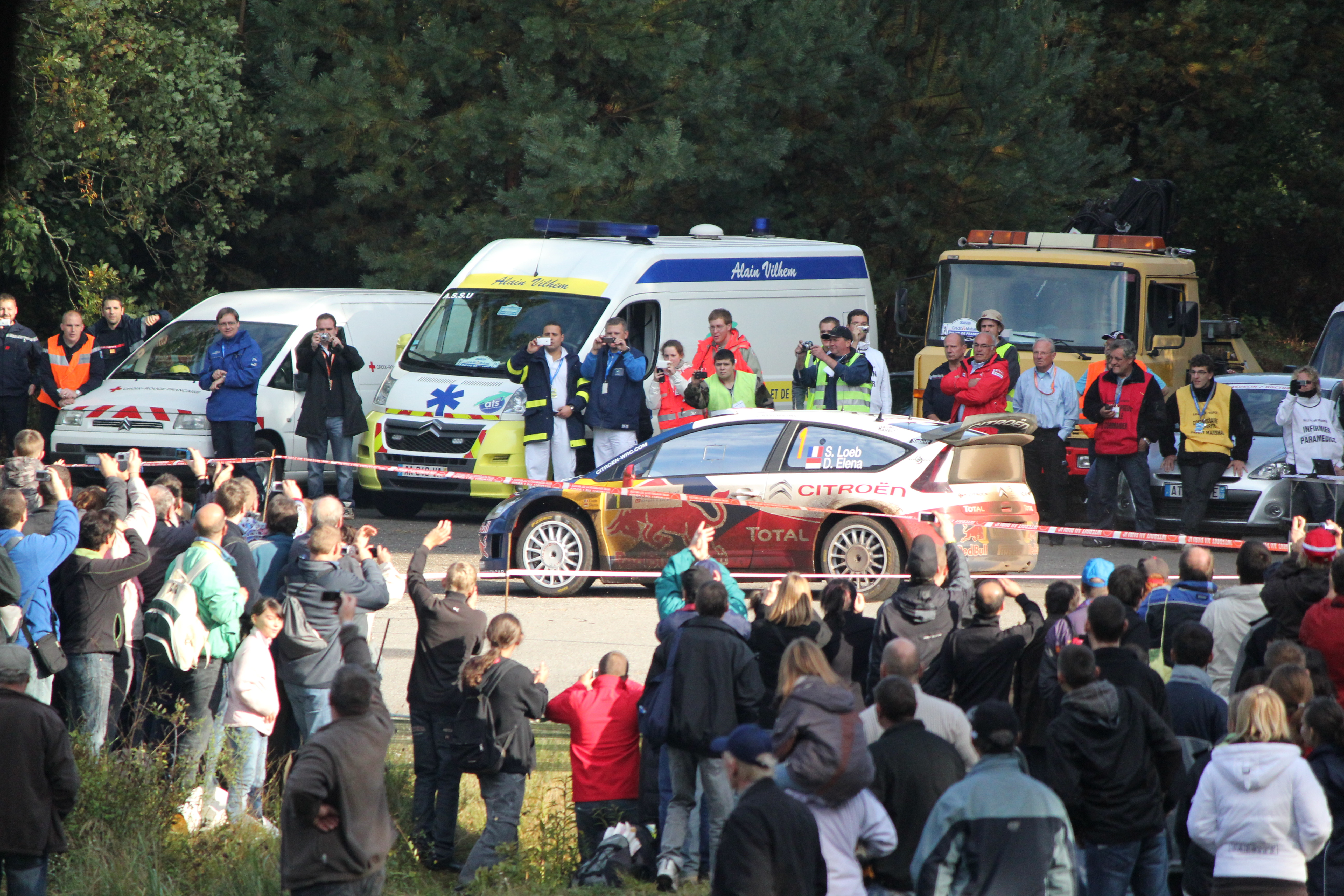 Sébastien Loeb & Daniel Elena au troisième jour, sur l'étape spéciale 18 du camp de Bitche, au rallye d'Alsace en France, lors du Championnat du monde des rallyes 2010.